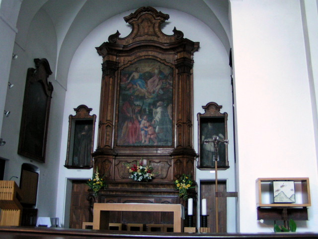 Altare della chiesa conventuale della Santissima Trinità (Lugano)